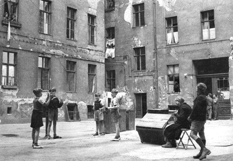 Zentralbild-Klein- 13.6.52 Die Mieter des Hochhauses Weberwiese in Berlin. Inmitten von Müllkästen, auf unhygienischen, trostlosen Hinterhöfen mußten die Kinder des Kollegen Schwertfeger bisher ihre Jugend verbringen. Siehe Begleittext.